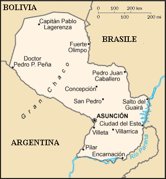 Paraguay: mappa Ripresa da Wiki inglese e italianizzata.